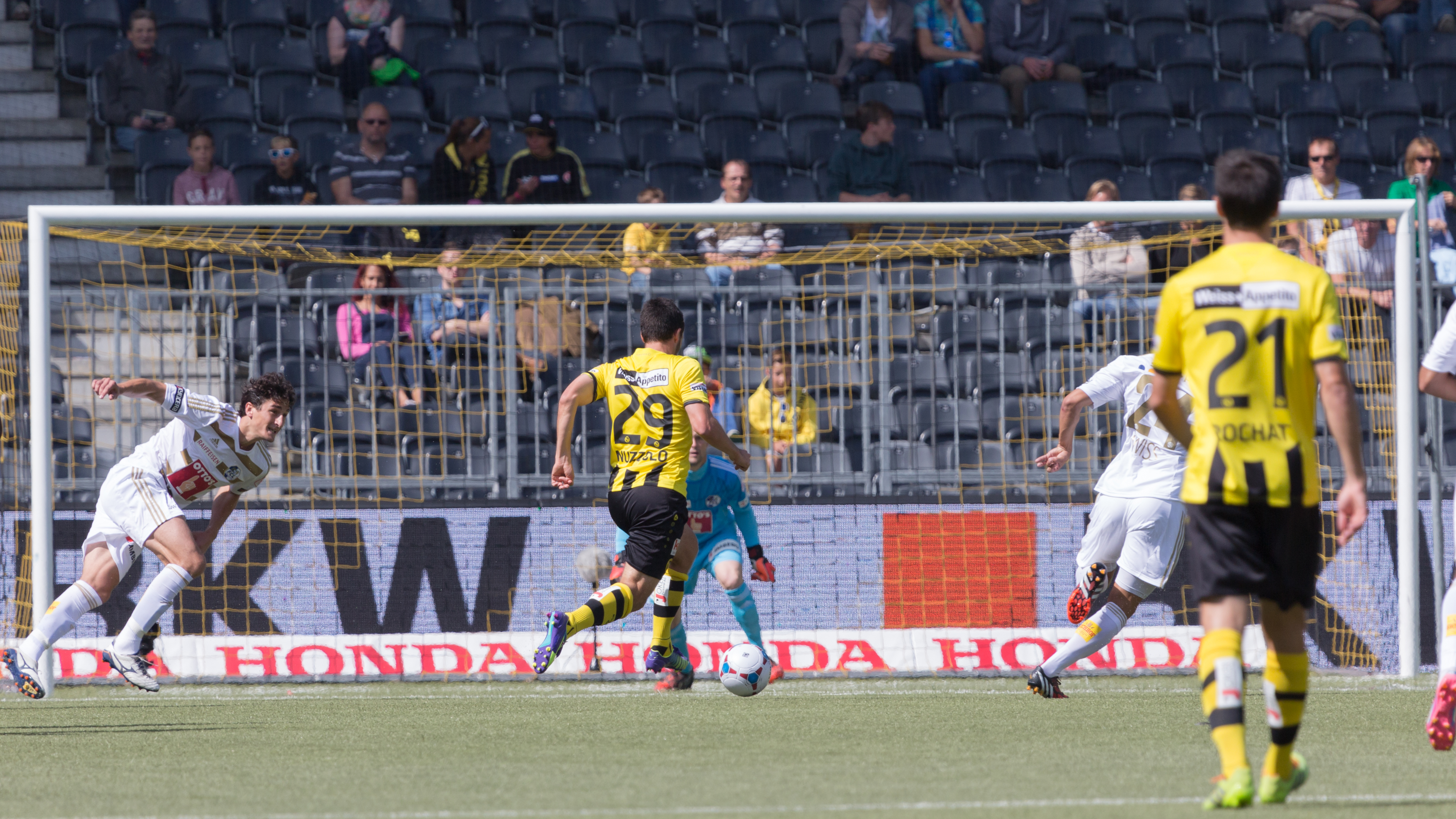 Raphaël Nuzzolo zieht beim Spiel des BSC Young Boys gegen den FC Luzern auf Torhüter David Zibung los; links: Andrés Lamas; rechts: Alain Wiss und Alain Rochat